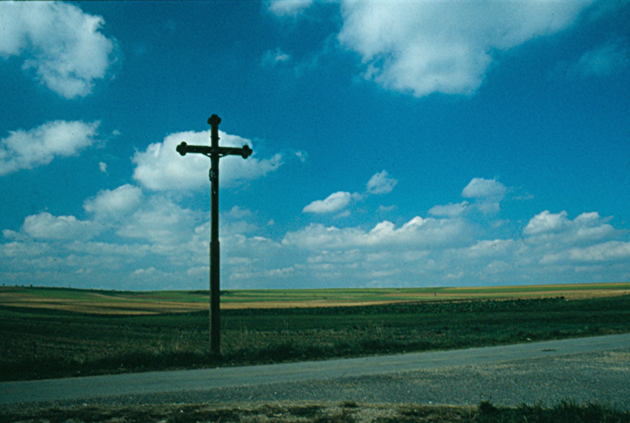 Feldkreuz auf der Schwäbischen Alb in den 1980er Jahren bei Hausen o.U. (Schelklingen)